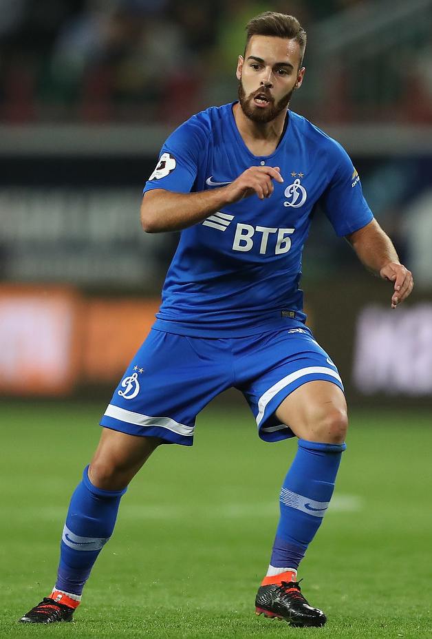 В московском дерби «Локомотива» и «Динамо» - ничья